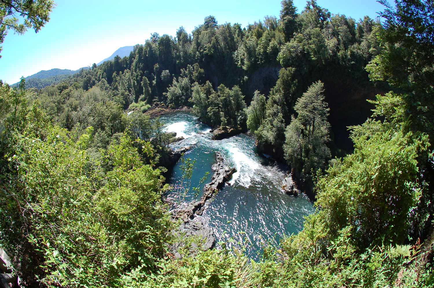 Vista Panorámica del Río Fuy, al interior de la Reserva Biológica Huilo-Huilo.